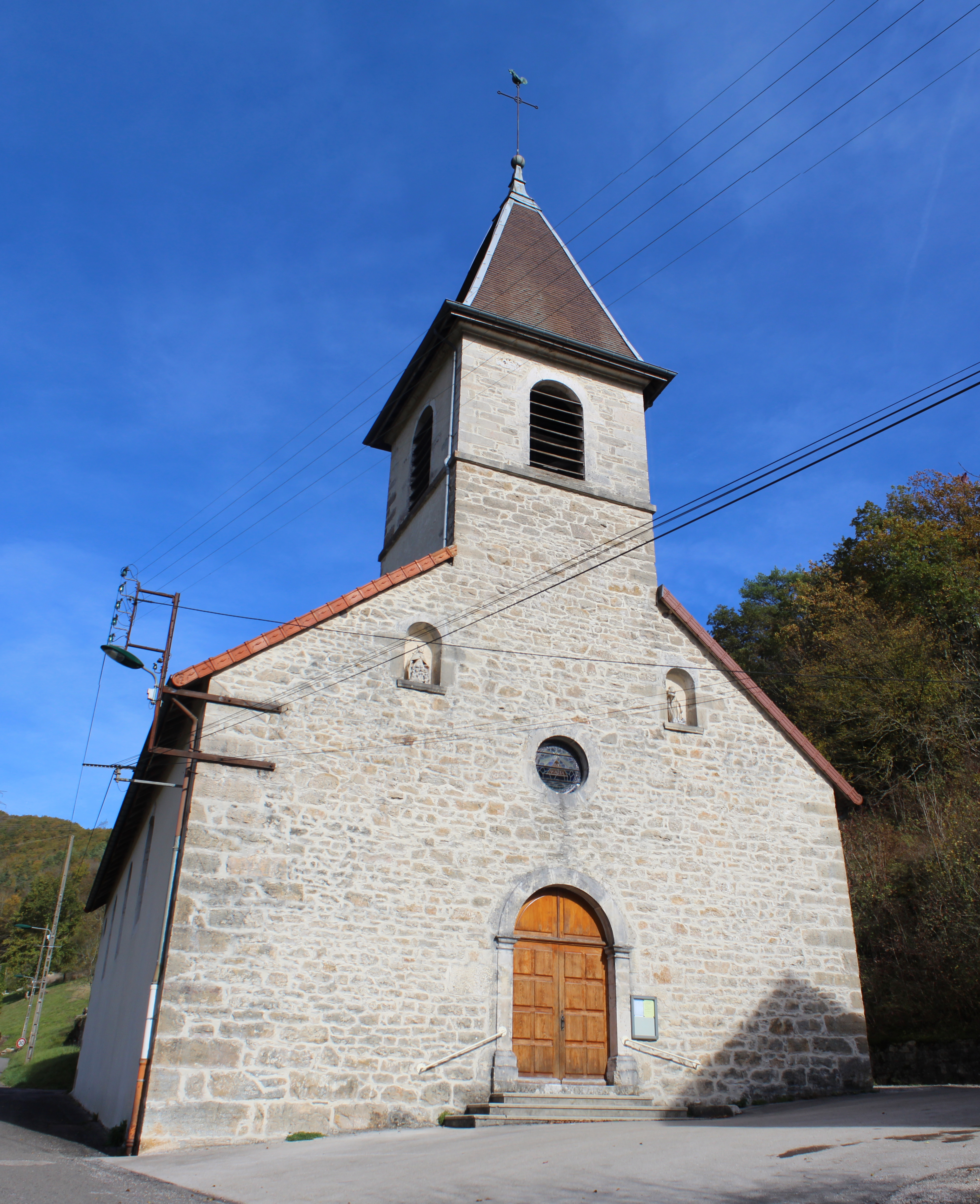 Église de l'Assomption-de-la-Mère-de-Dieu de Thoirette, Thoirette-Coisia.